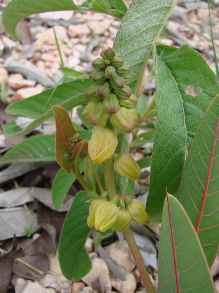 Manihot salicifolia - EUPHORBIACEAE Parque Nacional da Chapada dos Veadeiros - Povoado São Jorge - Alto Paraíso de Goiás - Goiás - Brasil.